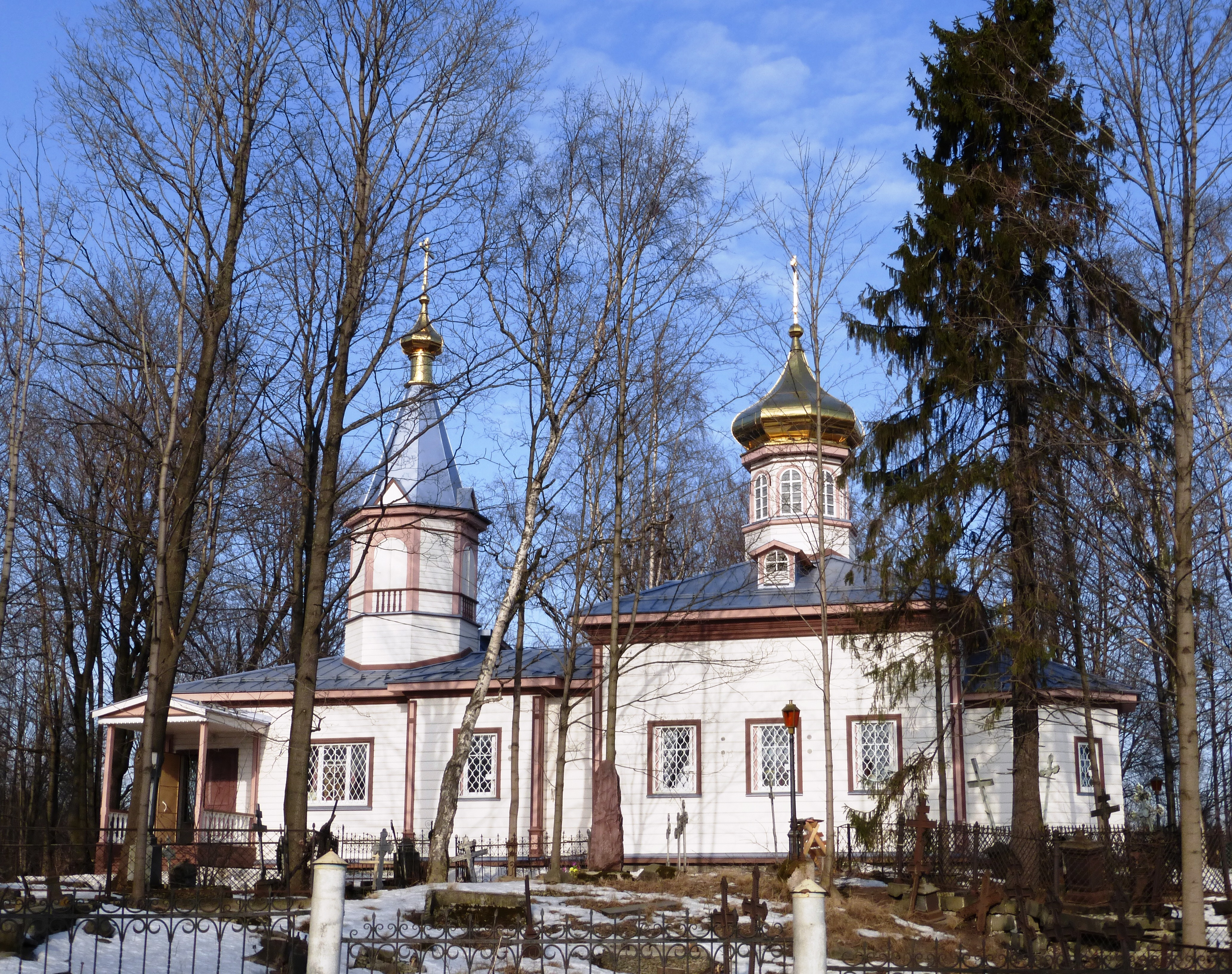 Екатерининская церковь на Неглинском кладбище Петрозаводска после капитального ремонта.(март 2014)